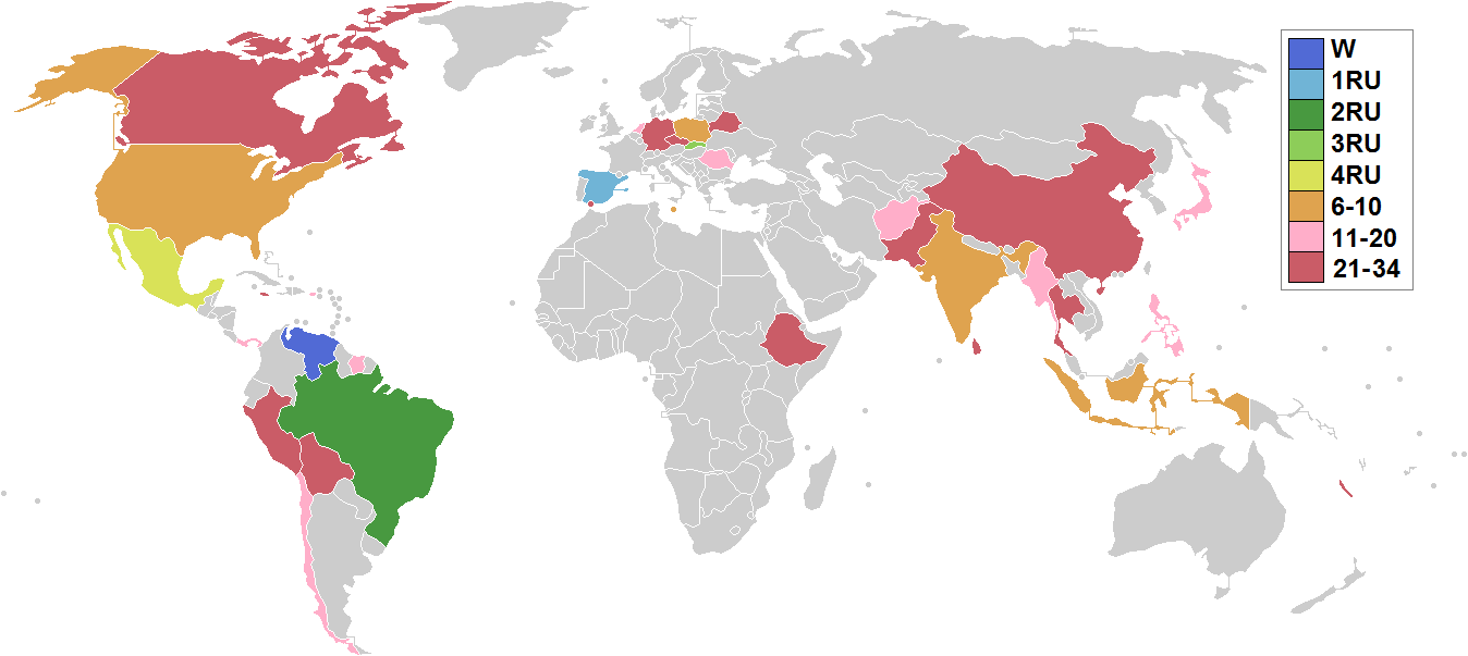 Państwa i terytoria zależne uczestniczące w konkursie Mister Supranational 2017